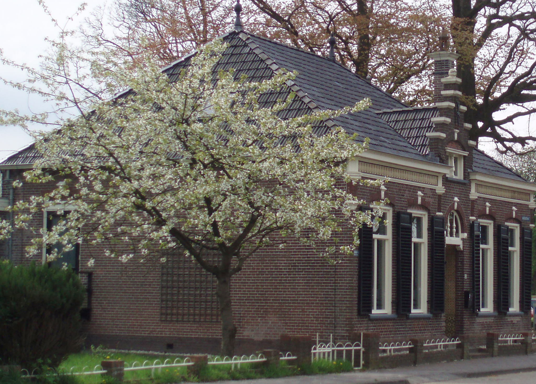 Huis met bloesemboom in Erica, Drenthe.